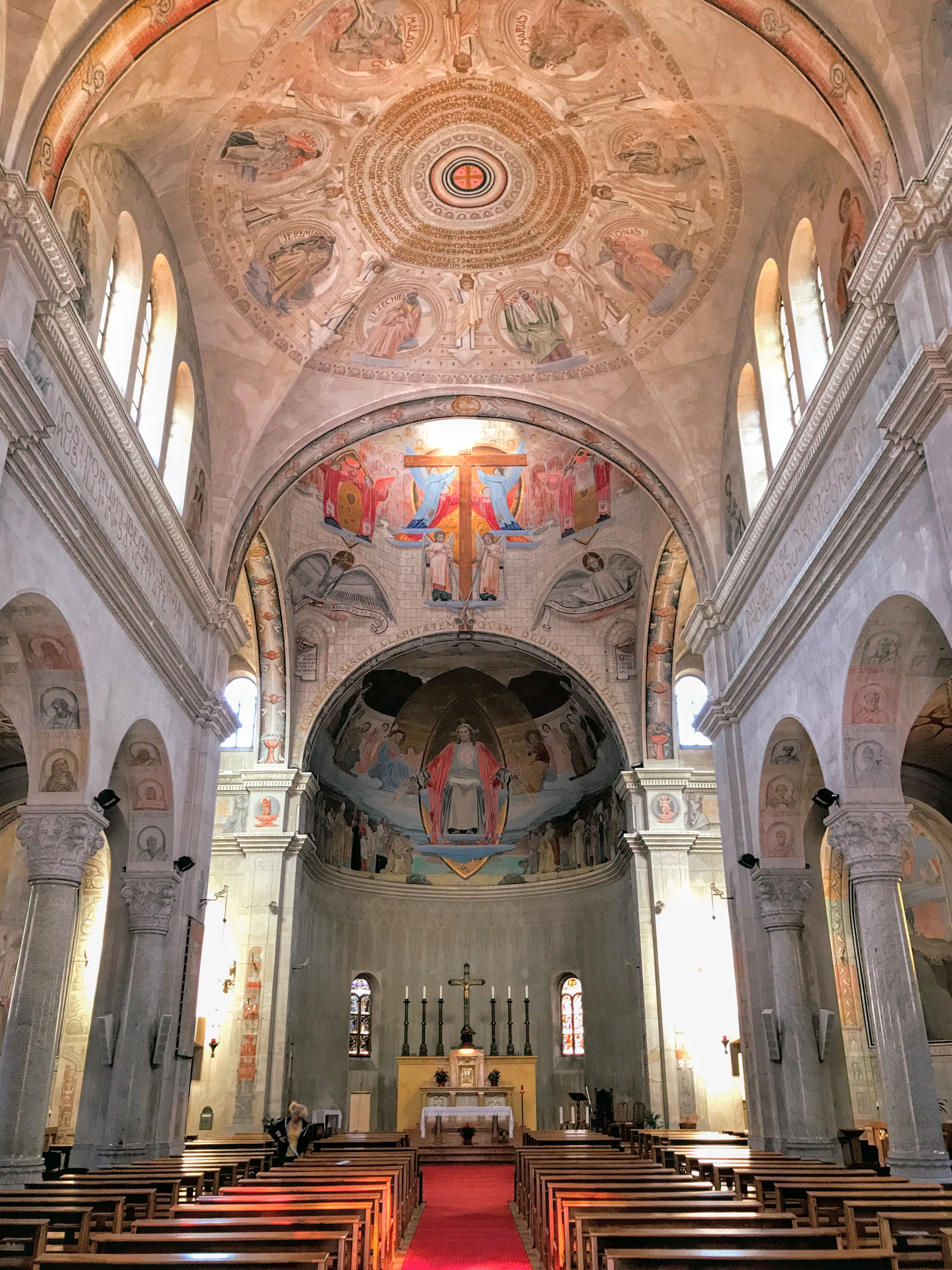 Chiesa del Sacro Cuore (Lugano) interior